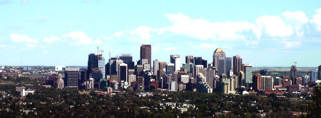 Panorama kota Calgary, Kanada.